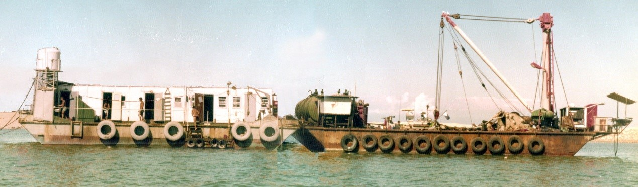 דוברת העגינה ומגורי הסיירת היתושים